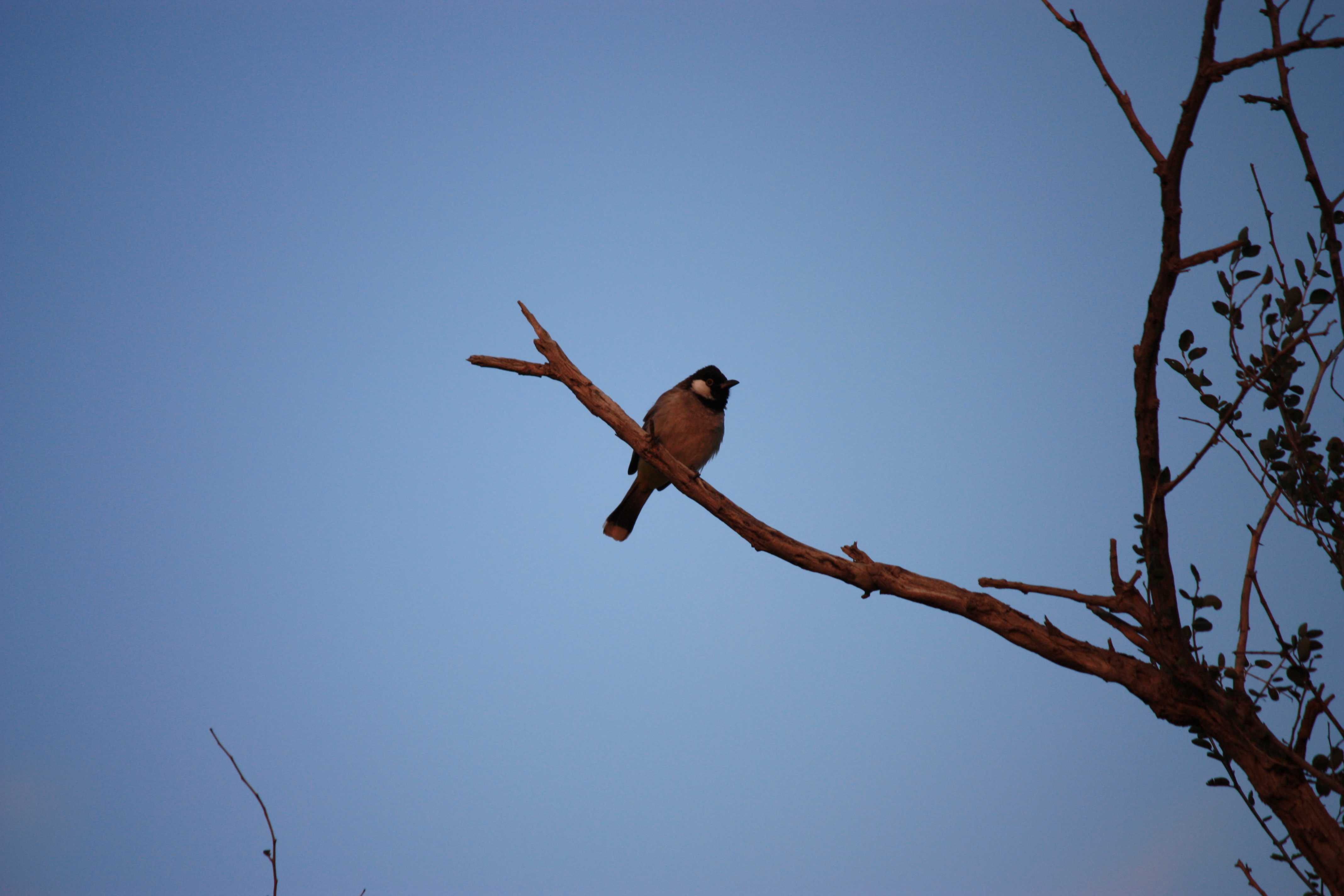 White-Eared Bulbul in Behbhan, Iran